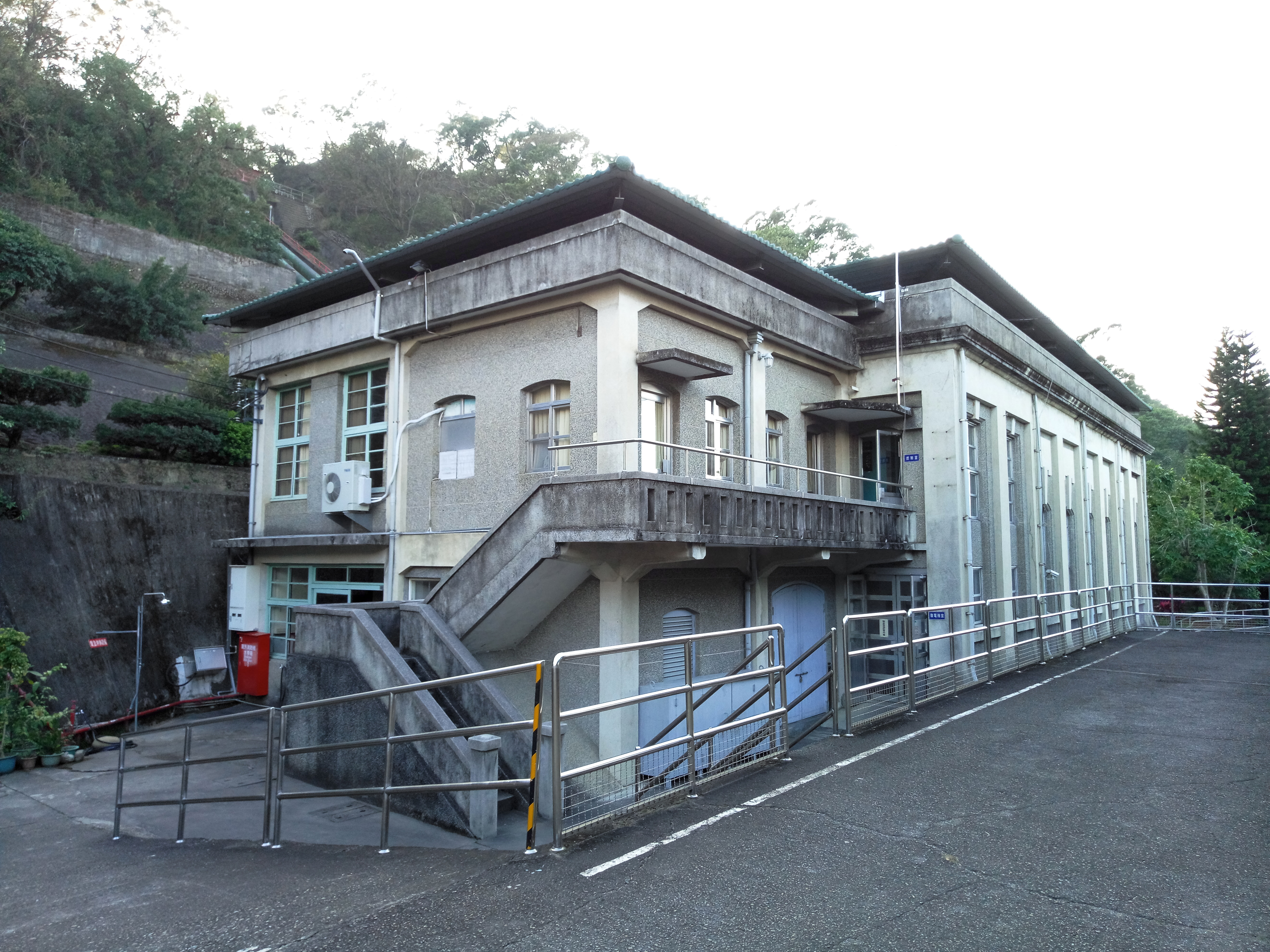 台電大甲溪發電廠后里機組發電廠房外觀